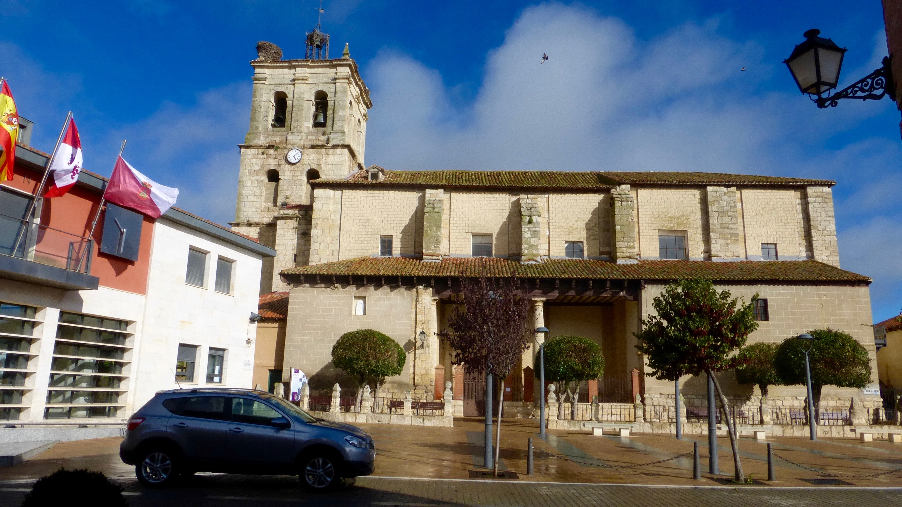 Iglesia de Santa Cruz de Grijota (Palencia, España).